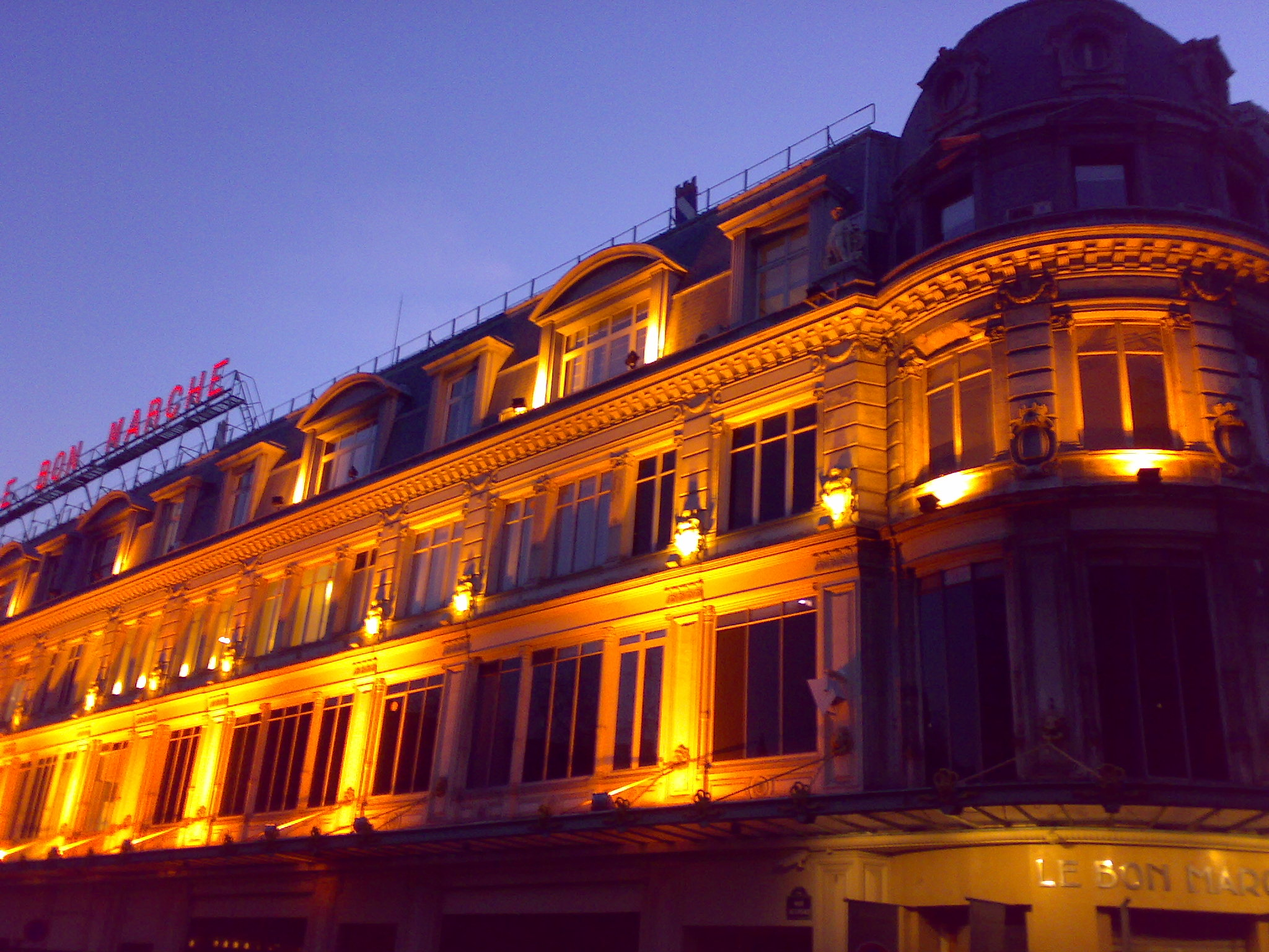 Extérieur du Bon Marché à Paris